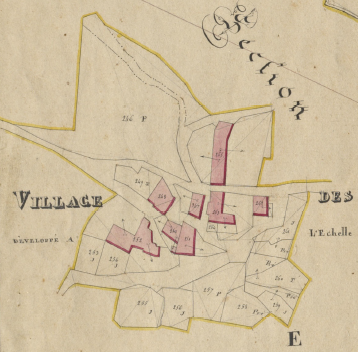 Els Cortals en el Cadastre napoleònic del 1812 (Arxius Departamentals dels Pirineus Orientals)